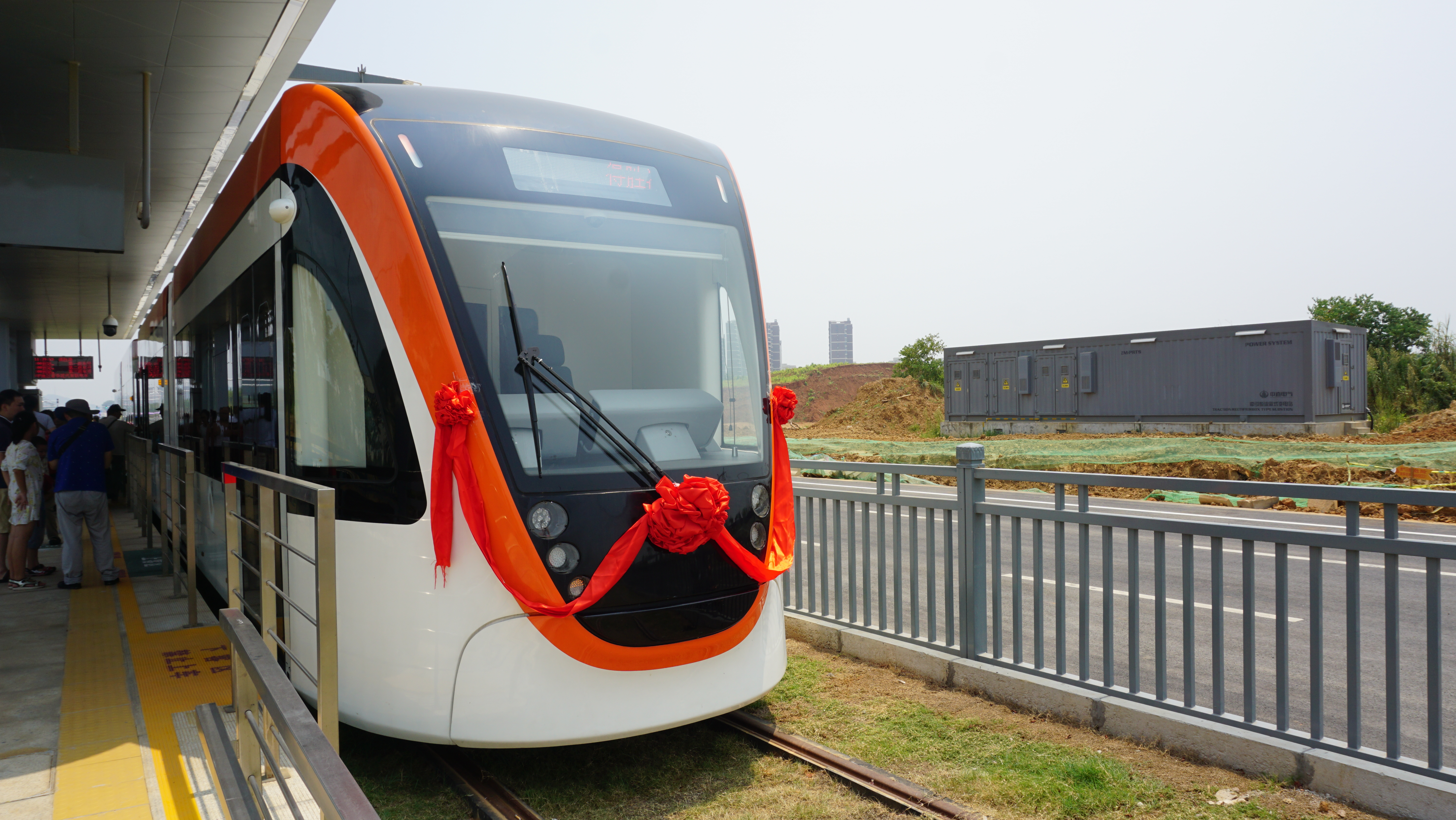 车都T1线